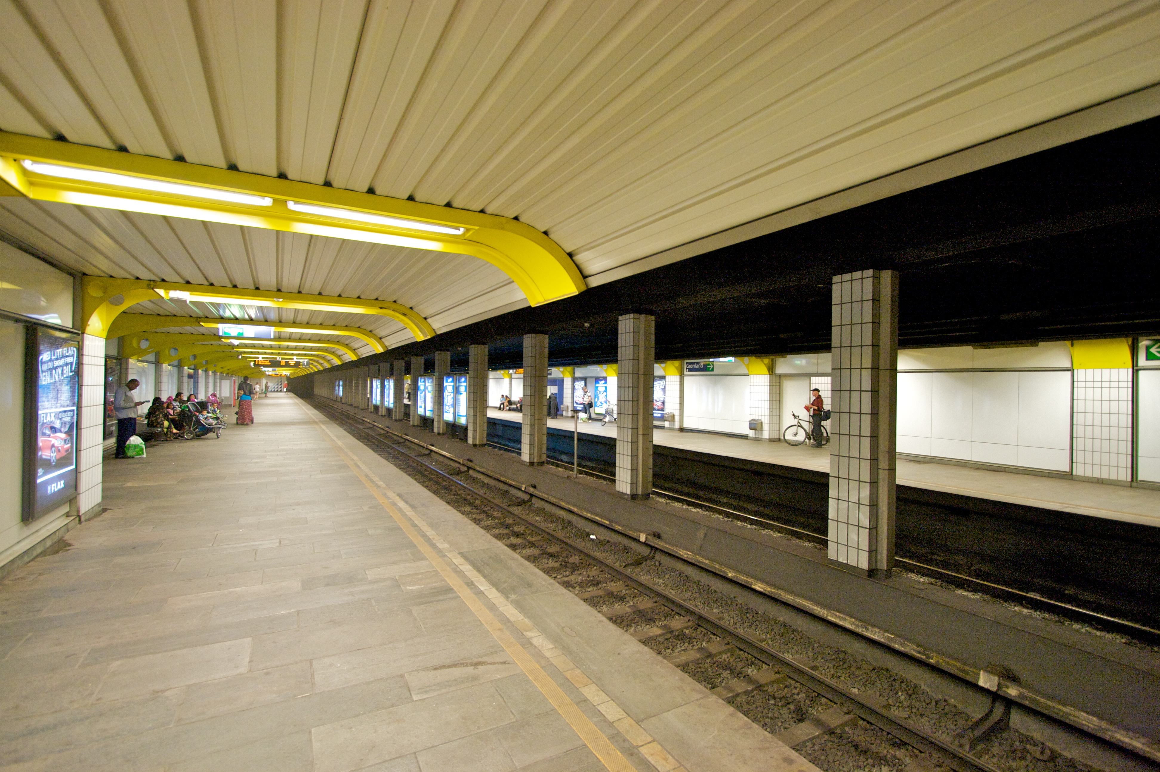 Grønland T-bane i Oslo.